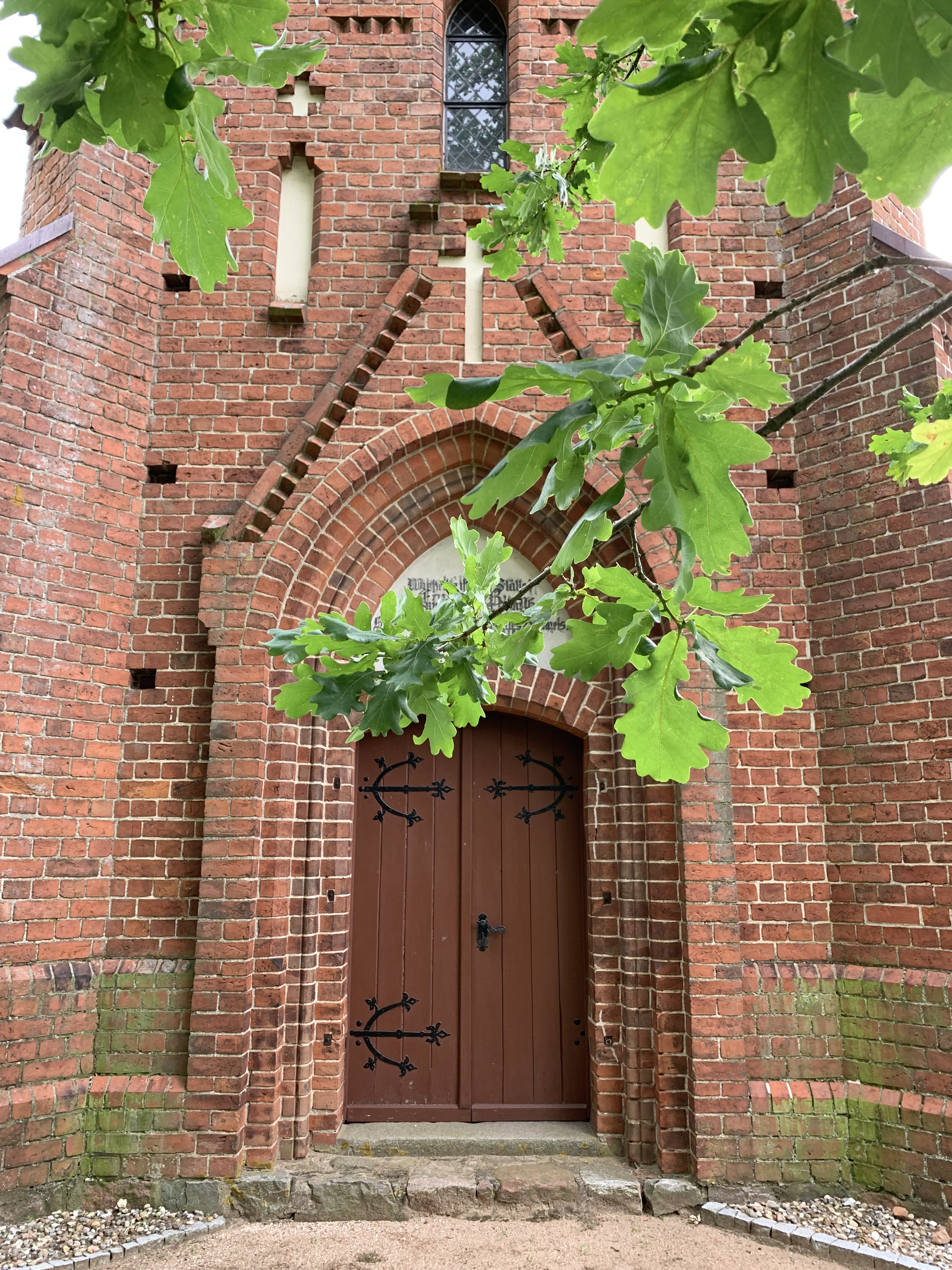 Die Kirche Linstow ist eine Backsteinsaalkirche in Dobbin-Linstow im Landkreis Rostock in Mecklenburg-Vorpommern. Im Innern steht eine neugotische Holzausstattung aus dem Jahr 1871.